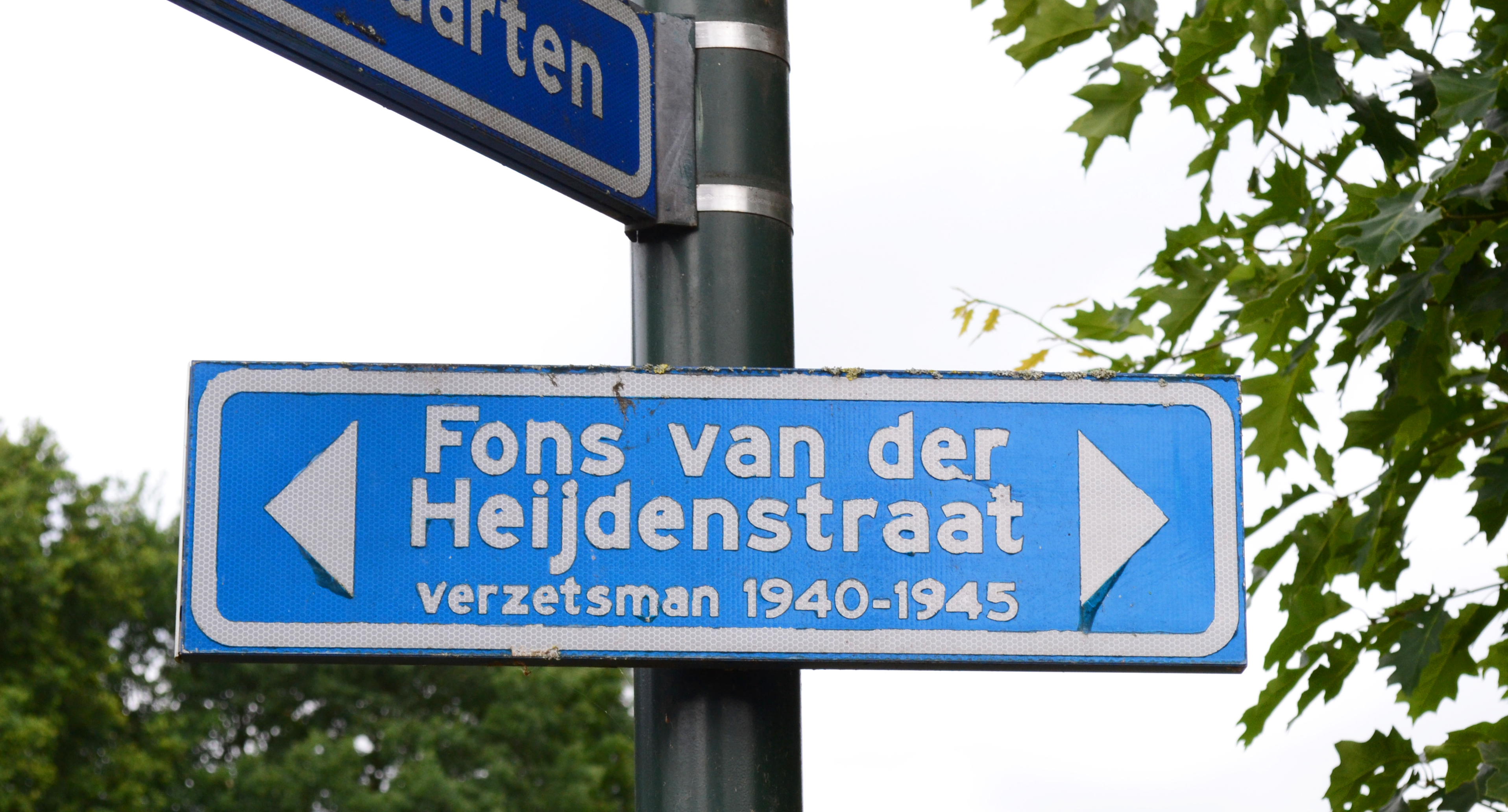 Straatnaambord Fons van der Heijden